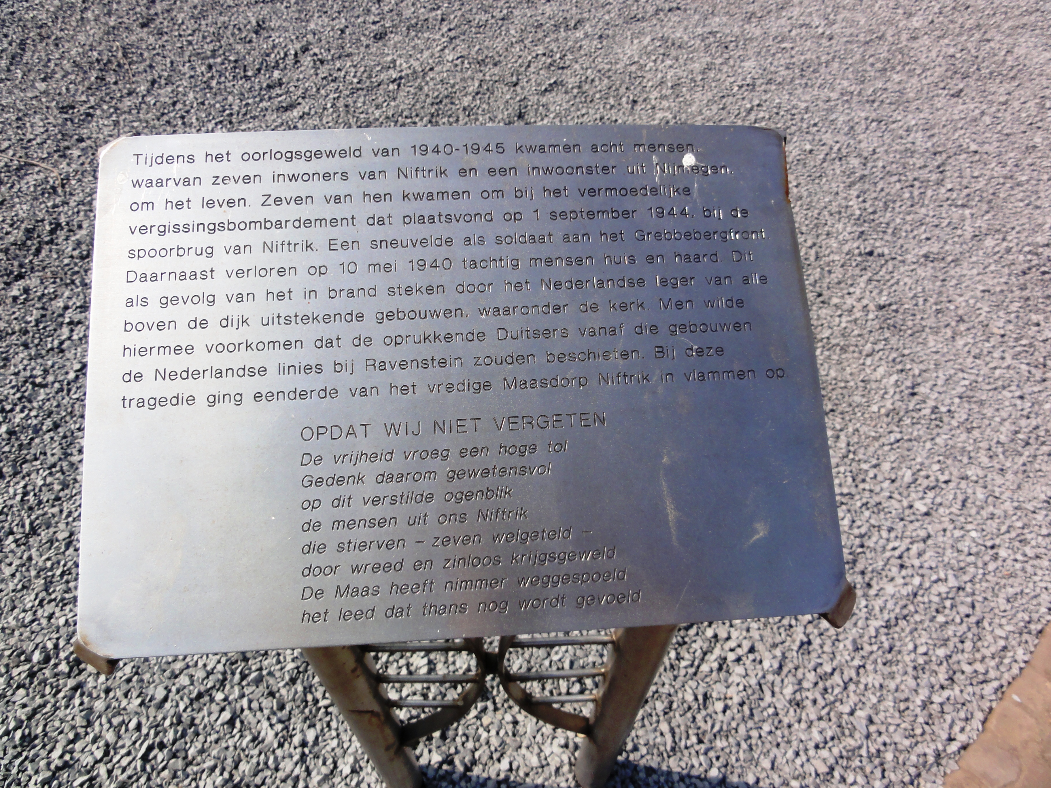 Monument WOII "Een brug te veel" Maasbandijk 66, 6606KE, Niftrik NL